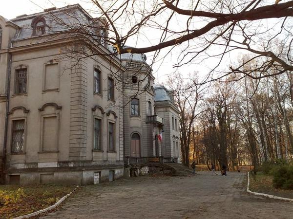 Pałac w Borkowicach. Widok od strony wschodniej - drogi dojazdowej do pałacu